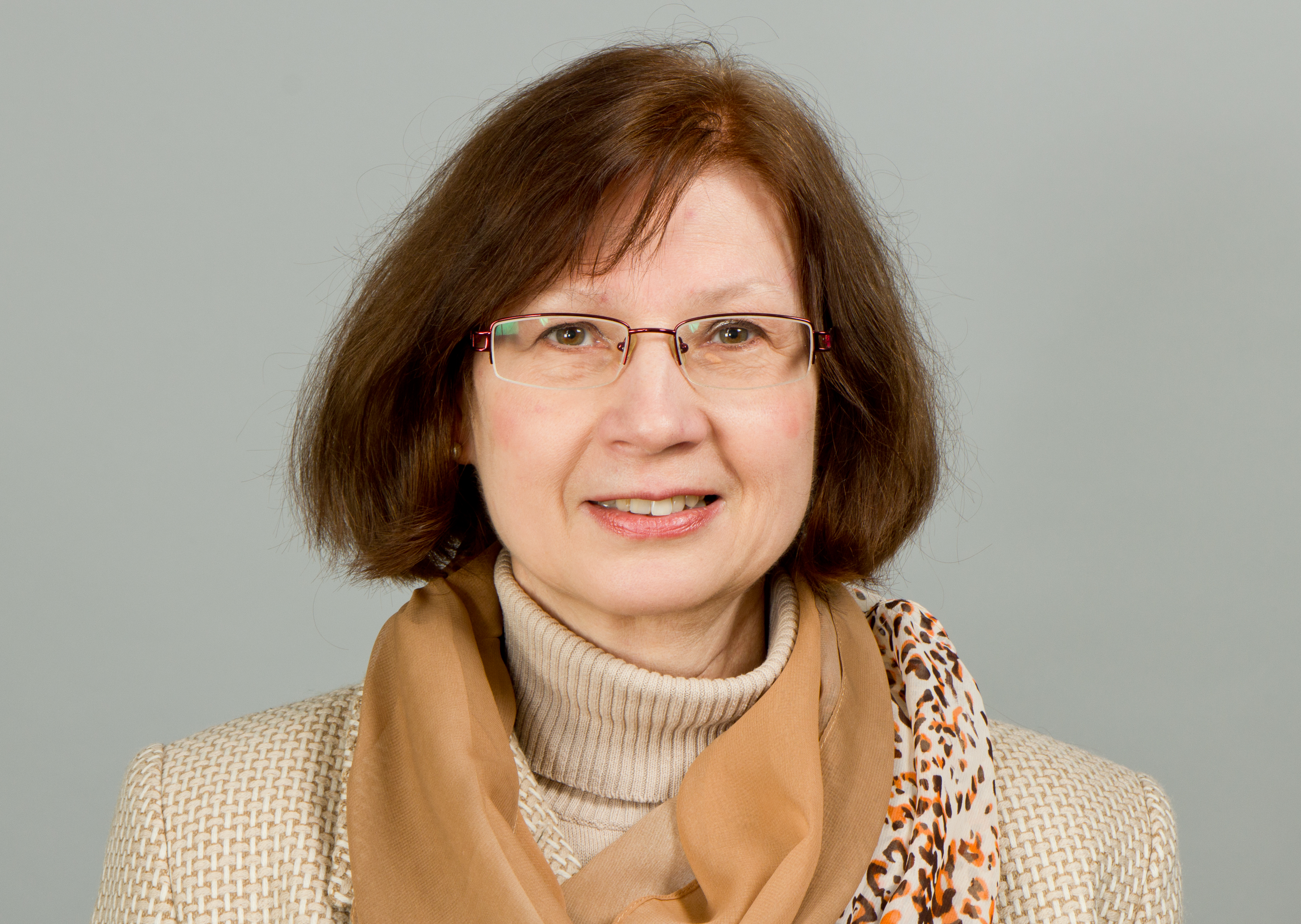 Liane Deicke (* 10. Februar 1954 in Salzwedel) ist eine deutsche Politikerin (SPD). Sie ist seit 2004 Mitglied des Landtages von Sachsen. Wikipedia im Landtag – Sachsen 17. bis 18. Dezember 2013 in DresdenDieses Foto wurde im Rahmen des Projektes „Wikipedia im Landtag“ erstellt. Fragen zur Nachnutzung Wenn Sie Fragen zur Nachnutzung dieses Bildes haben, können Sie sich jederzeit gern an wenden